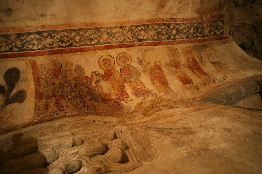 Crypte de la Cathédrale Notre-Dame de l'Assomption [Clermont-Ferrand]